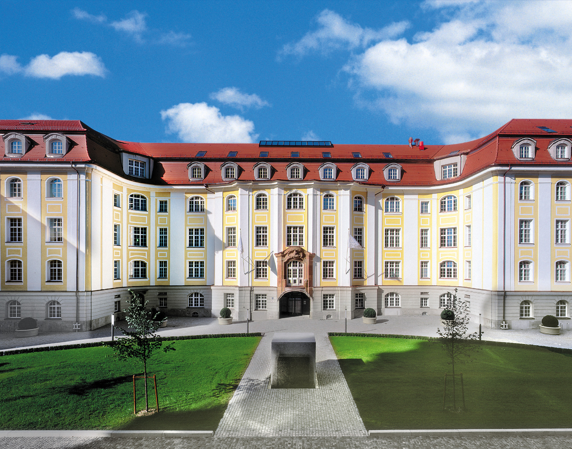 Das zentral gelegene Areal der Münchner Hopfenpost in der Hopfenstraße ist Teil der bayerischen Geschichte: Nahe dem Hauptbahnhof wurde von 1905 bis 1912 der umfangreiche Komplex des Bayerischen Verkehrsministeriums mit Zentralbriefamt unter Leitung des bedeutenden Münchner Stadtbaumeisters Hocheder im Stil des Neobarock errichtet. Der in der Nachkriegszeit von der Deutschen Post genutzte Standort erhielt mit der Ergänzung durch die Neue Hopfenpost um 1991 – gebaut als Münchner Paketpostzentrale – eine moderne Komponente. Etwa zehn Jahre später konnte an den früheren Glanz angeknüpft werden, indem der erhaltene Teil des früheren Ministeriumsbaus grundlegend saniert und umgebaut wurde. Heute präsentiert sich das Areal als modernes, repräsentatives Ensemble mit einzigartigem historischen Charme.